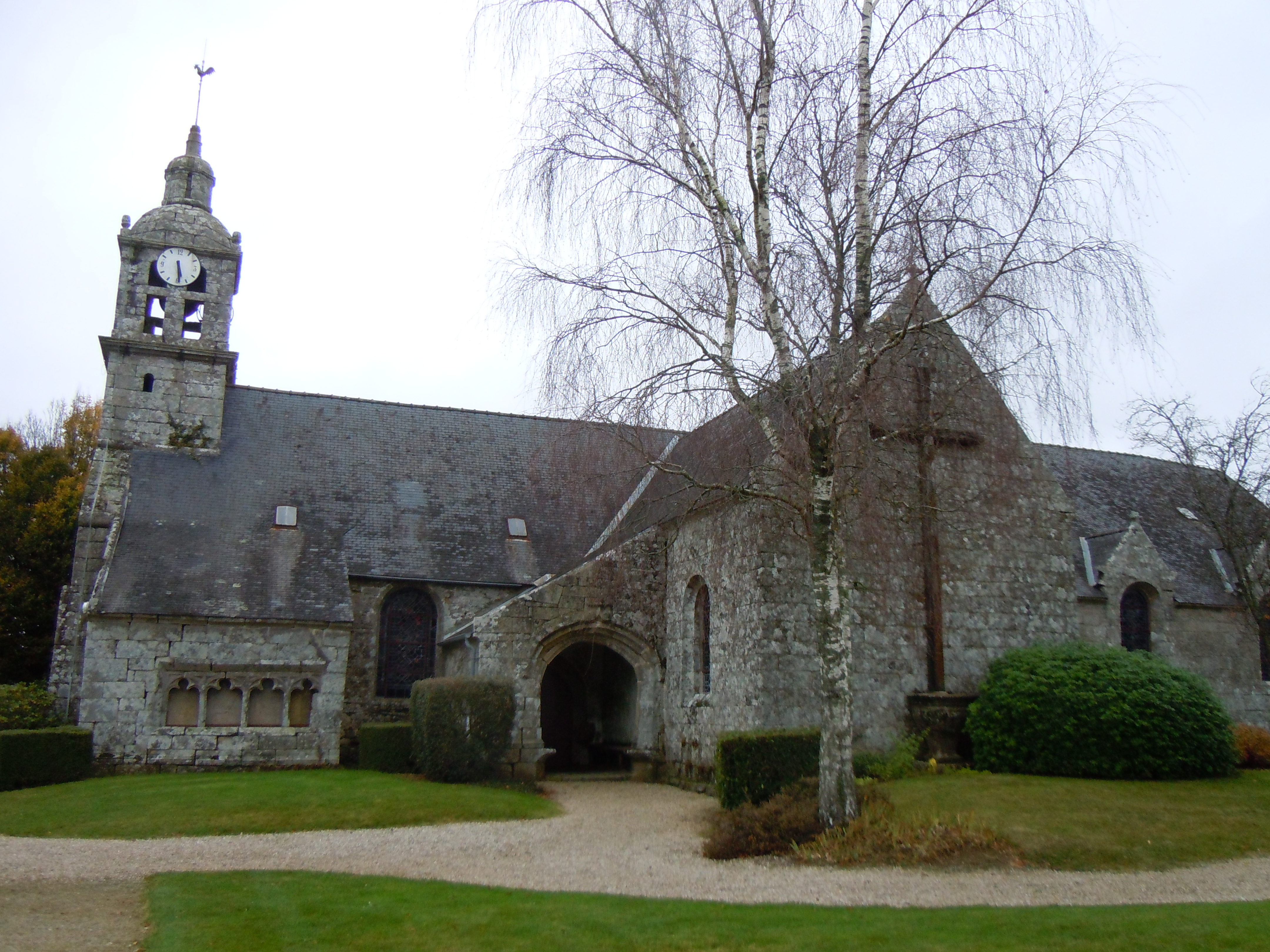 Église paroissiale de Le Saint (dédiée à Saint Samuel), façade méridionale (département du Morbihan). L'ossuaire adossé à l'église (côté gauche de la photo) est inscrit aux Monuments historiques, sous la référence PA00091651